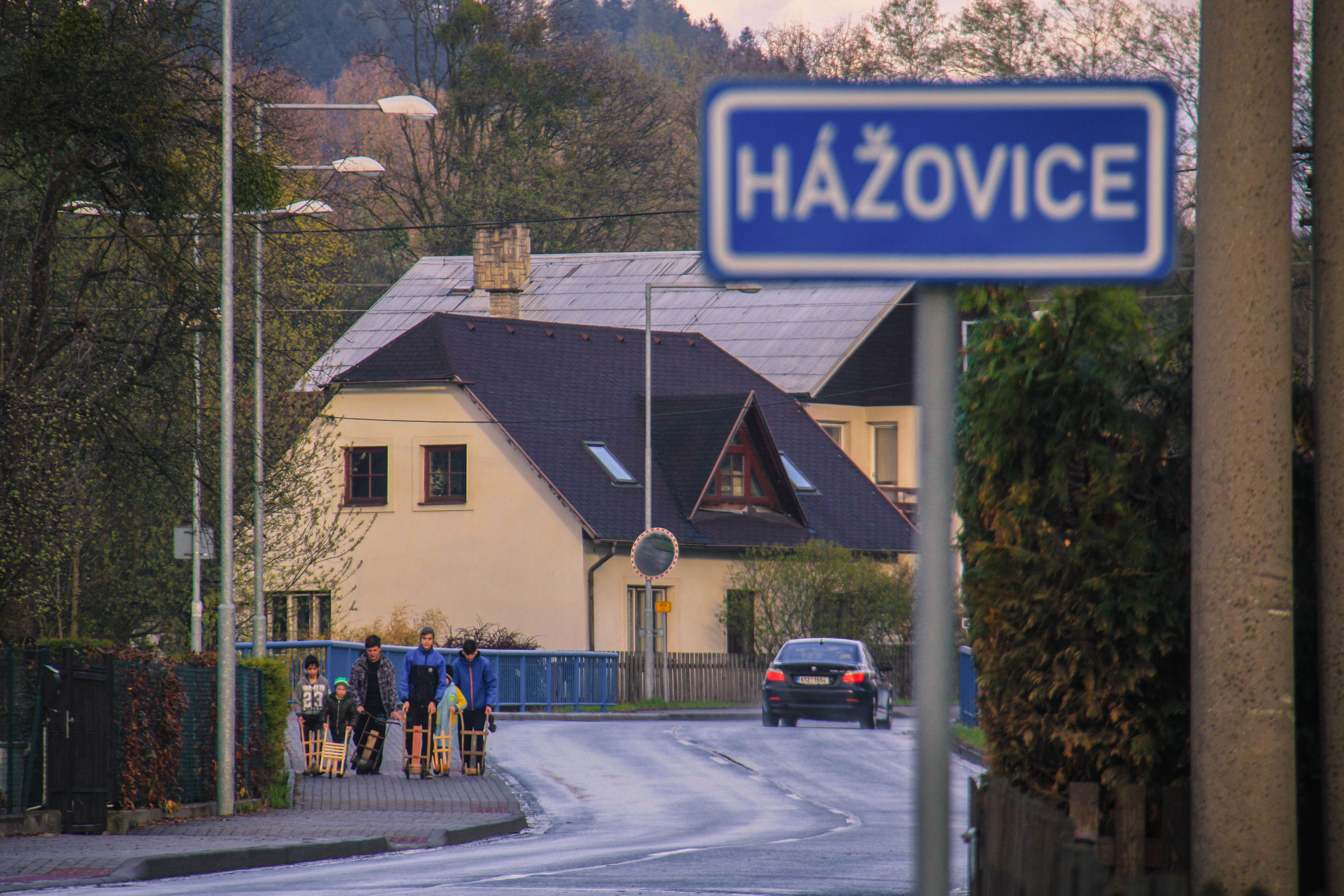 Terkotka taczkowa. Klepotarze (klapotáři) obchodzą domy ze swoimi klapotkami (rapači).